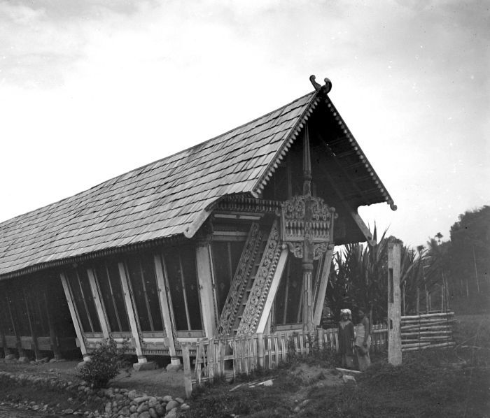 Negatief. Rijstschuur te Lolo Gedang met fraai houtsnijwerk, Sumatra